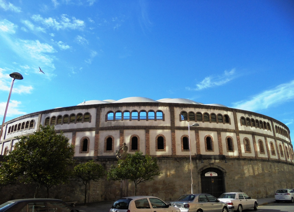 Plaza de Toros en Pontevedra capital